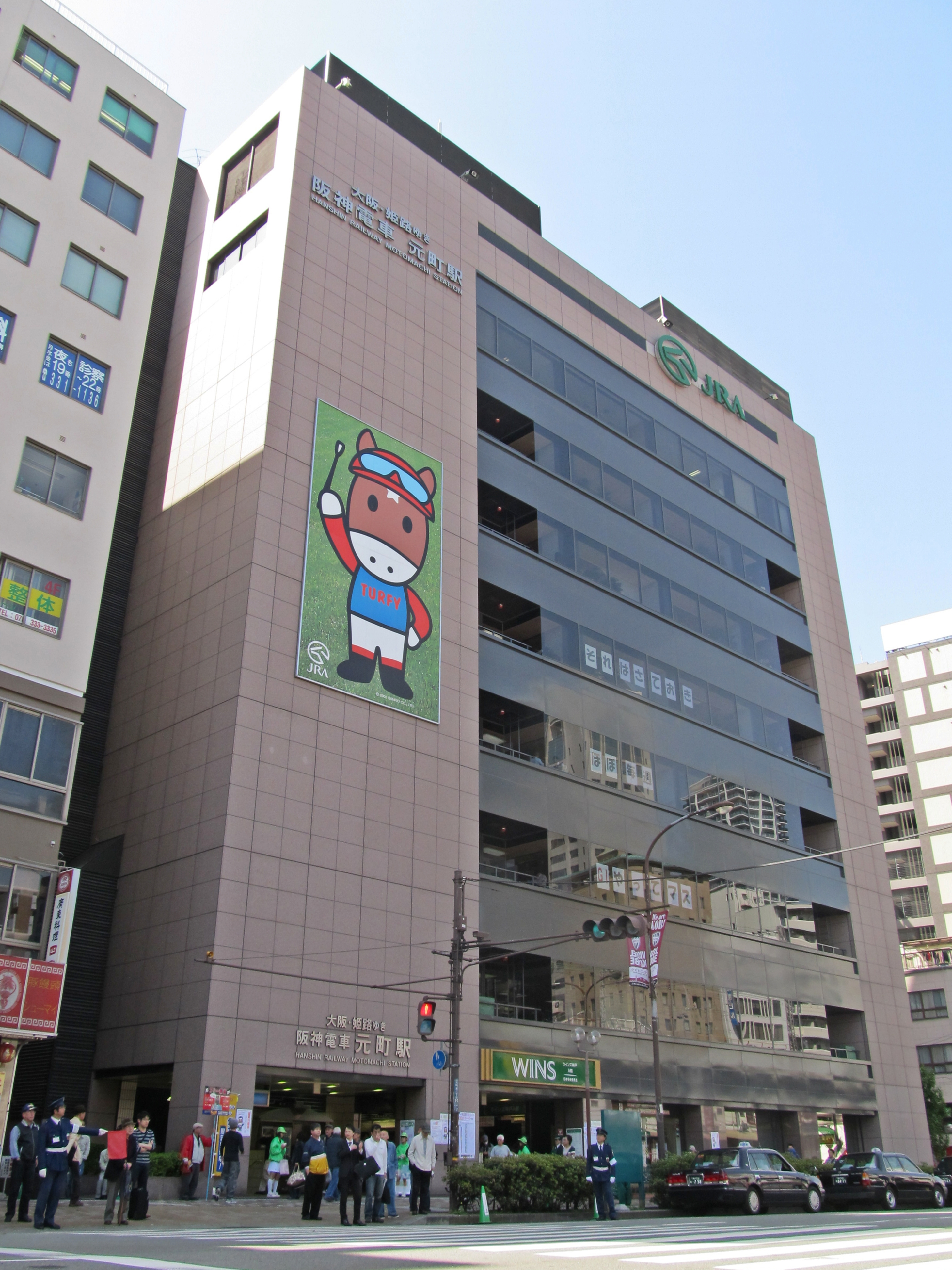 ウインズ神戸A館（兵庫県神戸市中央区元町通2丁目10）